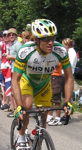 Santiago Botero, colombian cyclist at 2005 TdF